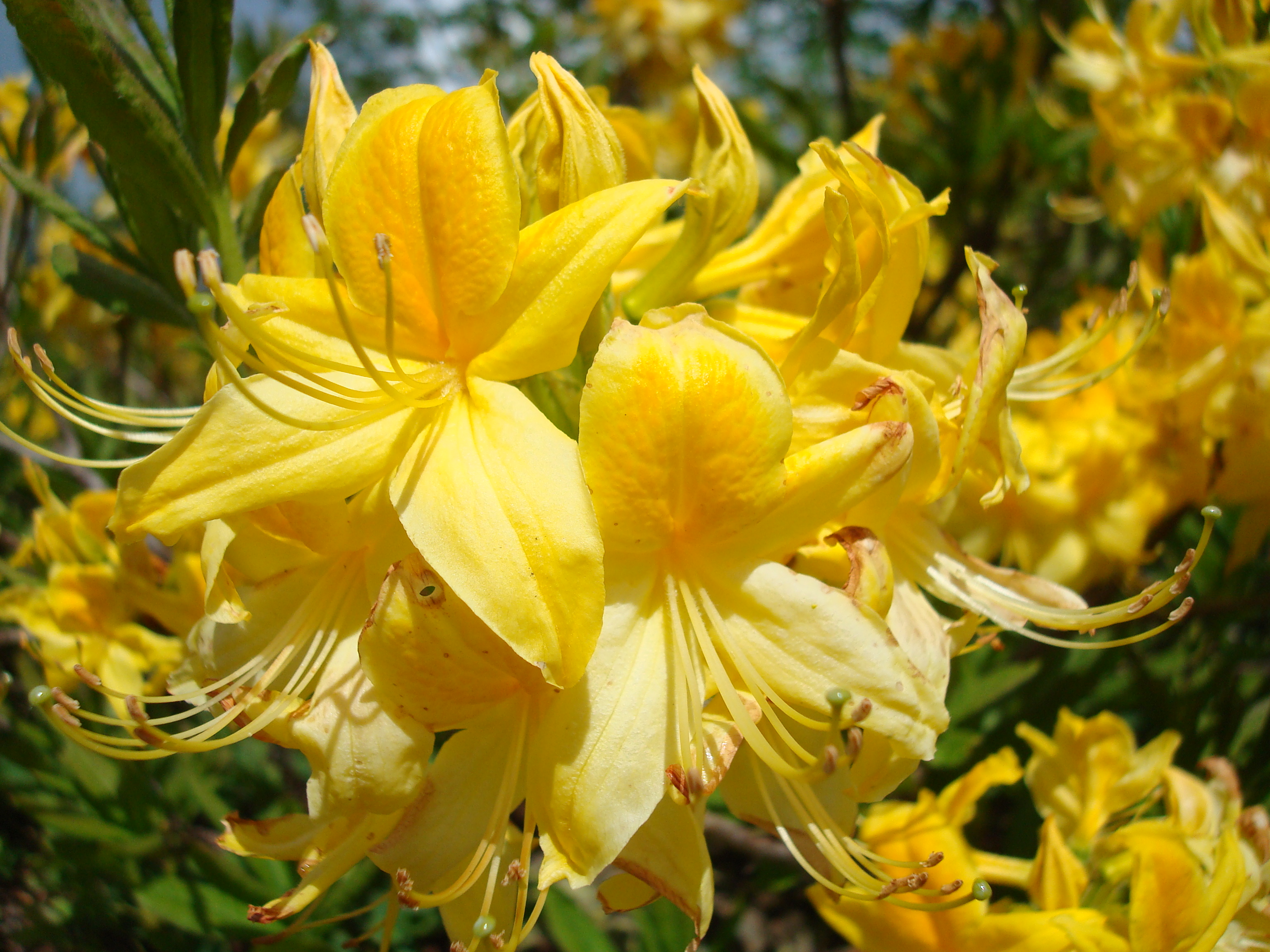 Цветущая азалия в горах на склонах горы Ачишхо. Большие Сочи (Сочи), Сочи This image is related to the protected area of Russia number 2300355